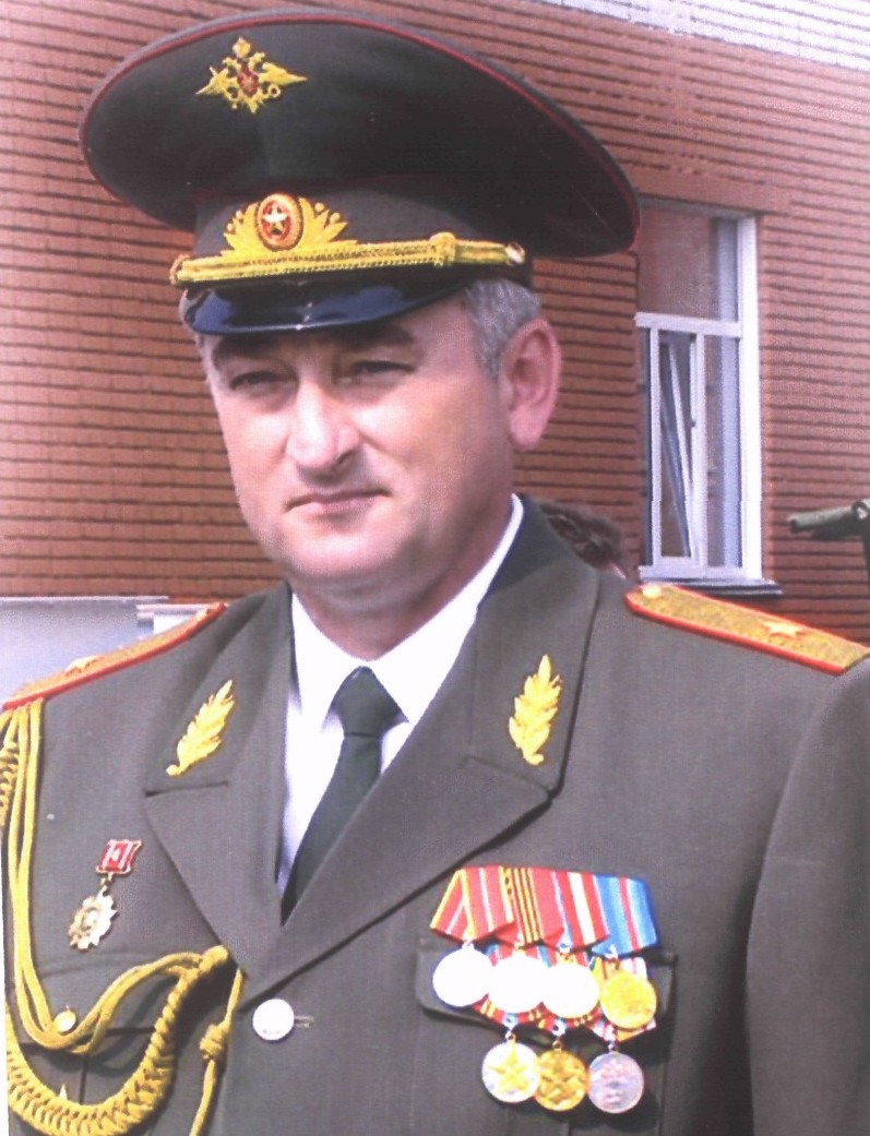 Генерал-полковник Зарудницкий Владимир Борисович